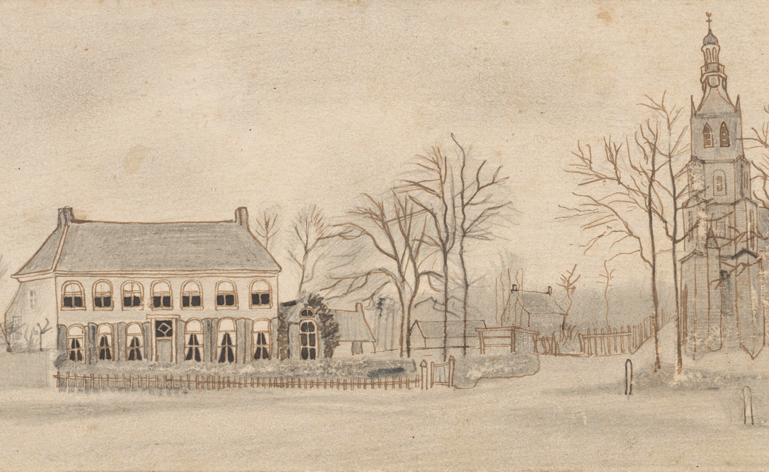 Etten, april 1876 potlood, pen in inkt, op papier, 9.5 cm x 17.8 cm